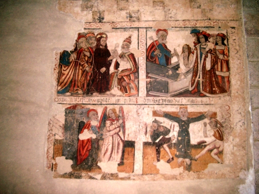 Catedral de Mondoñedo